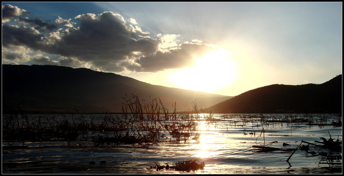 La laguna de cajititlan formó parte del gran lago del estado de Jalisco en México. Se encuentra en el municipio de Tlajomulco de Zuñiga en la zona metropolitana. El lago cuenta con una gran variedad de peces entre los que encontramos, La mojarra, la carpa, el charal, la tilapia, entre otra cantidad de peces de esa índole, en este lugar esta permitido pescar con atarralla de una medida de 3 pulgadas como unidad mínima.